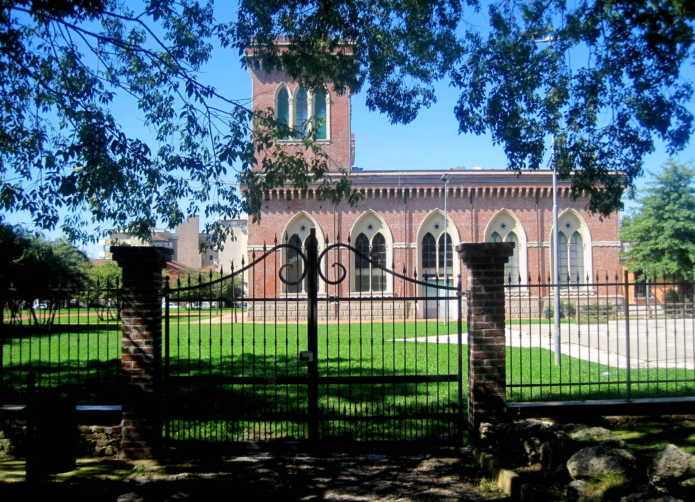 Museo del tessile e della tradizione industriale This is a photo of a monument which is part of cultural heritage of Italy.